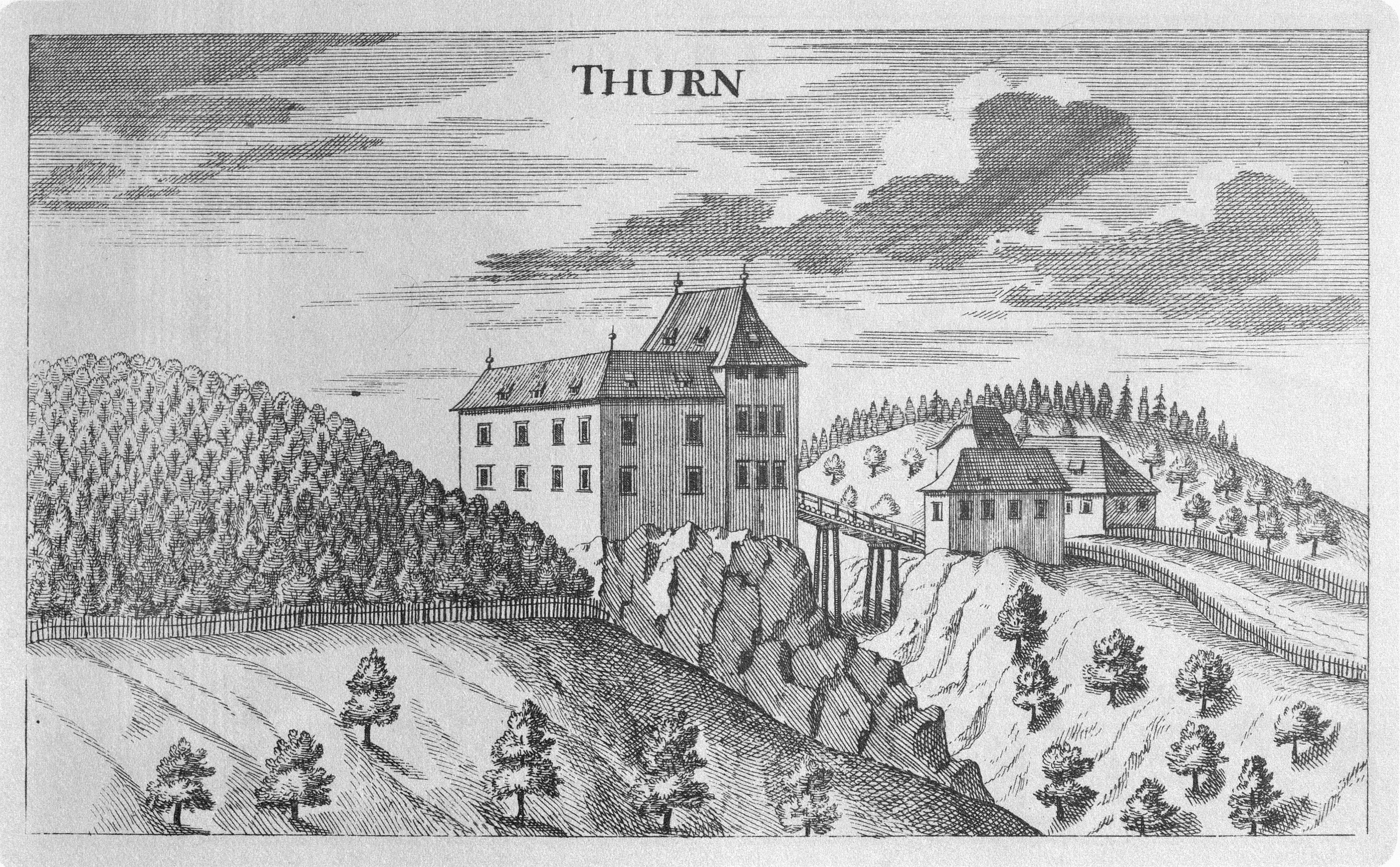 G. M. Vischers Käyserlichen Geographi, Topographia Ducatus Stiriae, Das ist: Eigentliche Delineation / und Abbildung aller Städte / Schlösser / Marcktfleck / Lustgärten / Probsteyen / Stiffter / Clöster und Kirchen / so es sich im Herzogthumb Steyrmarck befinden; Und anjetzo Umb einen billichen Preyß zu finden seynd Bey Johann Bitsch Universitäts Buchhandlern / Auff dem Juden=Platz bey der guldenen Saulen. Graz 1681 Die Nummerierung der Dateien folgt der alphabetischen Reihung der Ortsnamen und entspricht nicht dem Vischer-Register